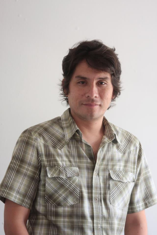 Escritor peruano Jeremías Gamboa.